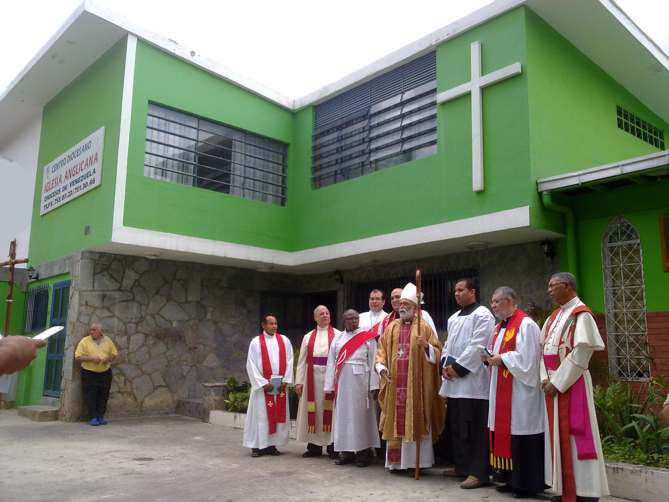 Clero de la Diócesis Anglicana Episcopal de Venezuela y Curaçao.